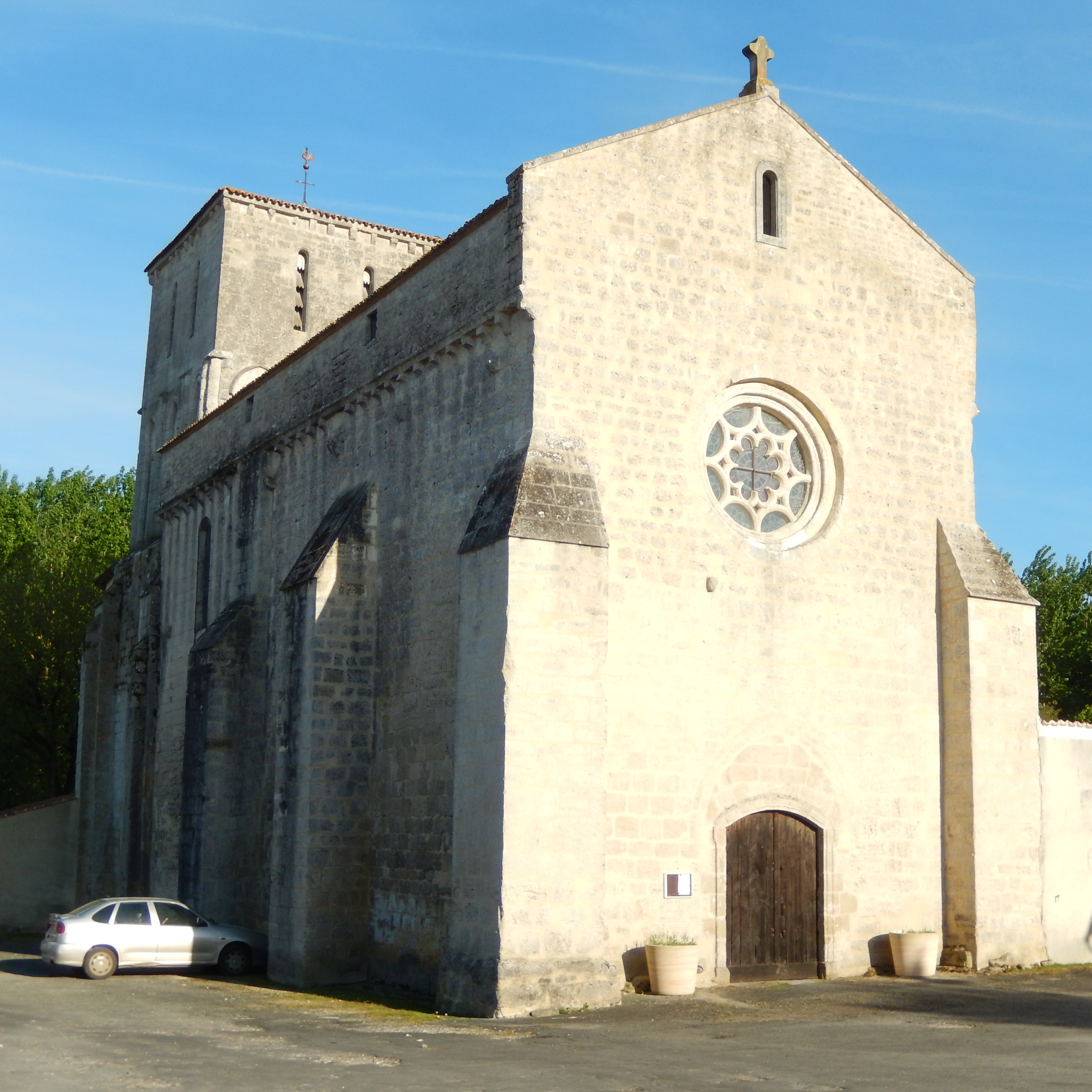 L'église Notre-Dame de l'Assomption, vue par sa façade ouest, à Dœuil sur le Mignon (Charente-Maritime, France).